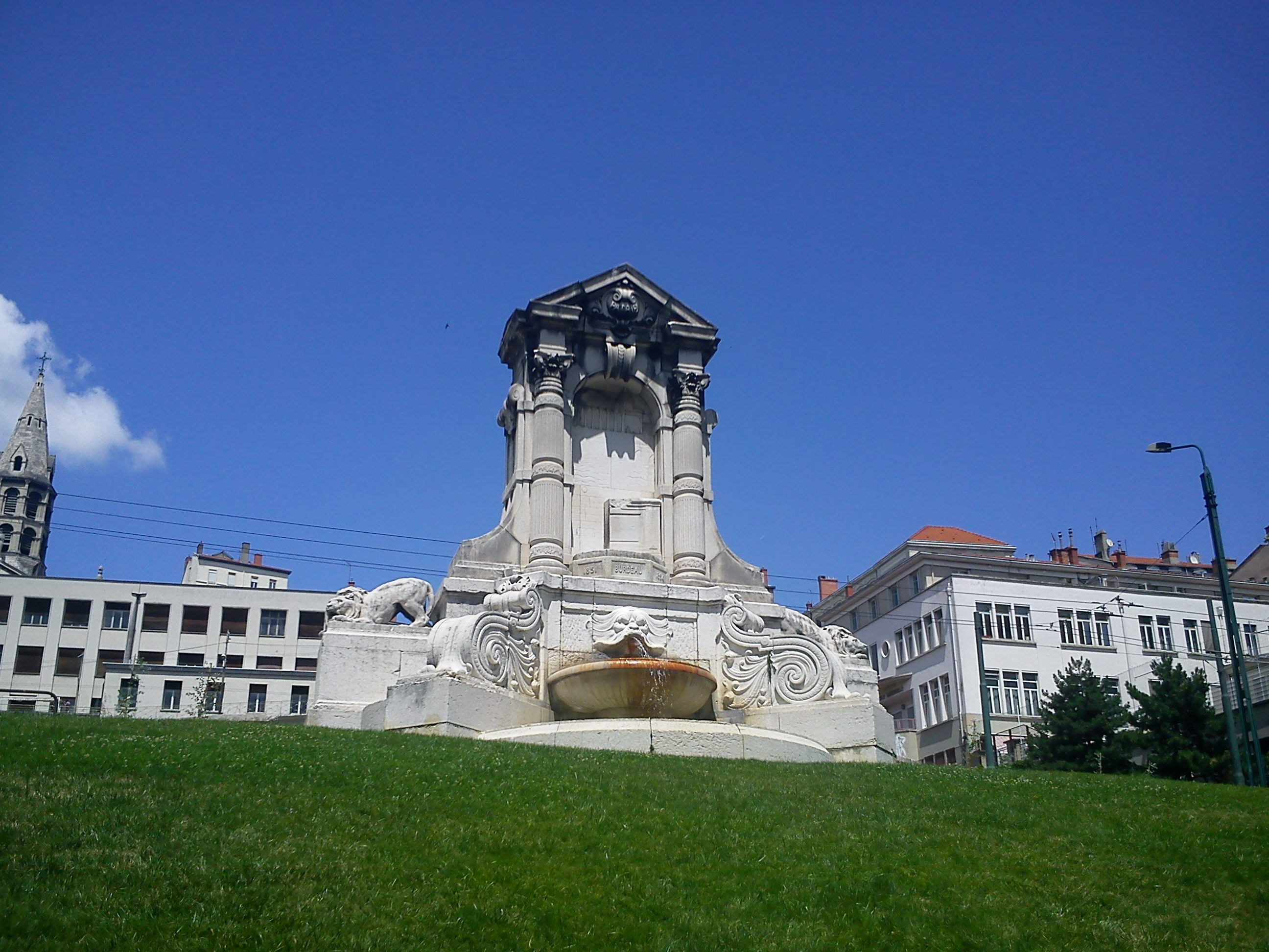 Fontaine de la statue Burdeau à Lyon